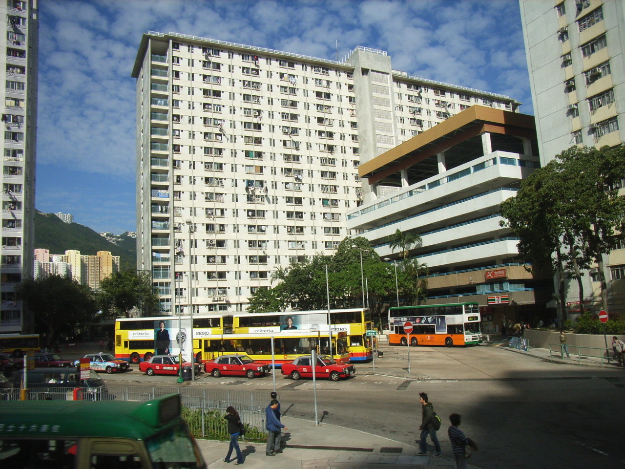 Ap Lei Chau Estate, Hong Kong Photographer:User:Apade1872